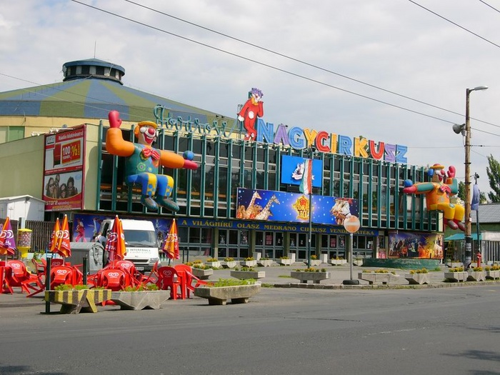 Nagycirkusz, Budapest, Hungary